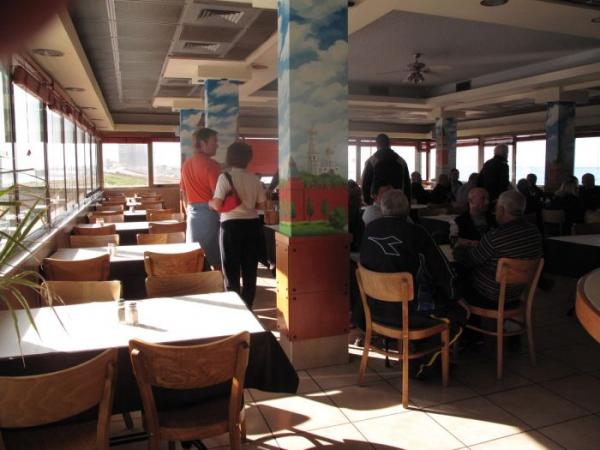 מסעדת מקסים בדרום חיפה. הייתה יעד של פיגוע התאבדות בשנת 2003